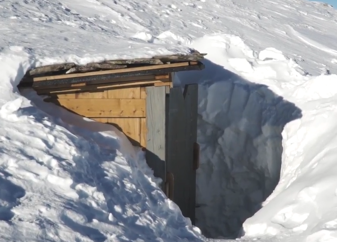 дерев'яний з бетонним фундаментом